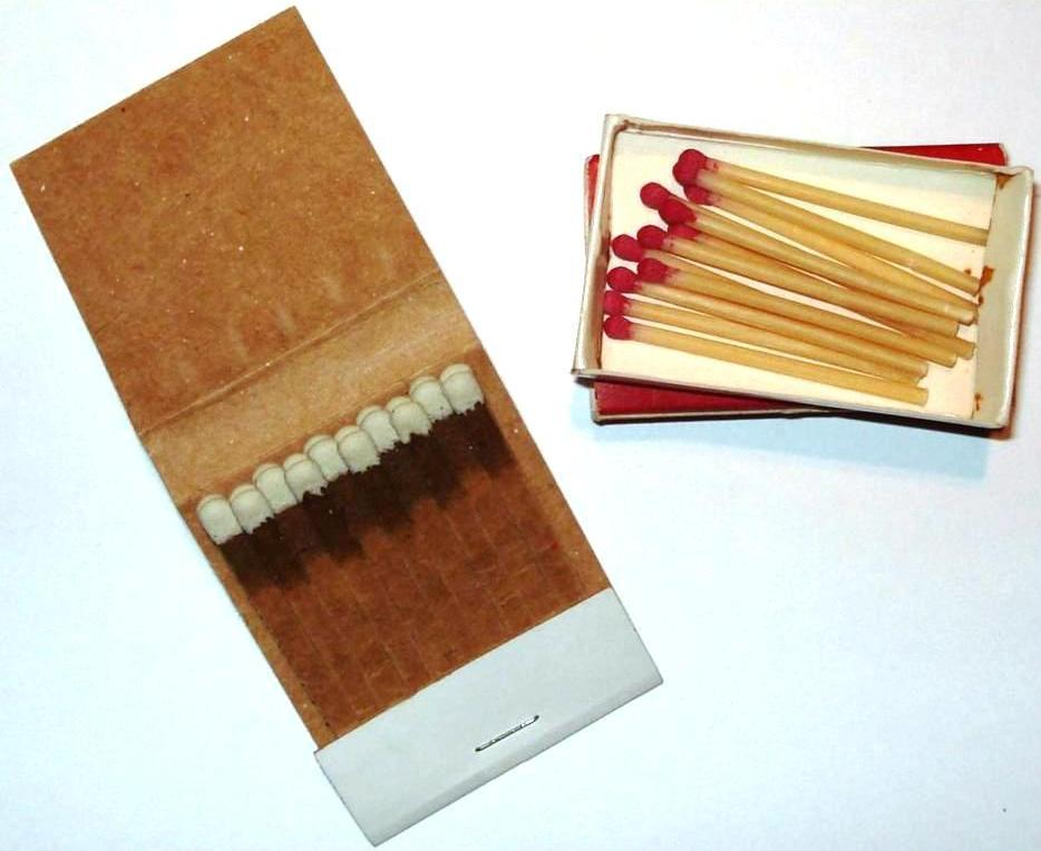 Streichhoelzer aus Pappe & Papier.